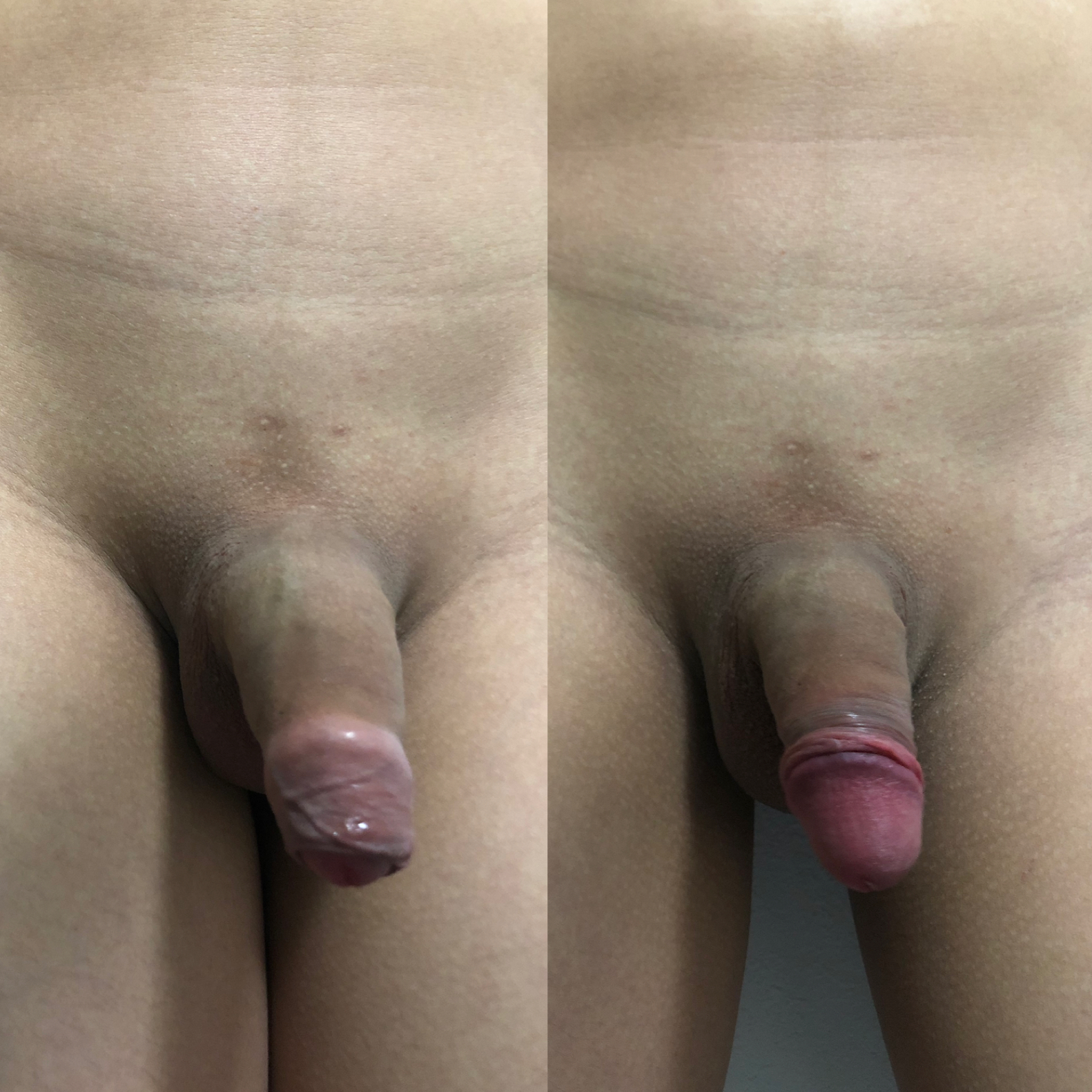 同一人物の男性器の仮性包茎。左を撮影後包皮を翻転し右を撮影。その後合成。